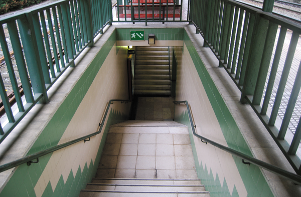 Estación de Ollargan de Renfe Cercanías - Adif